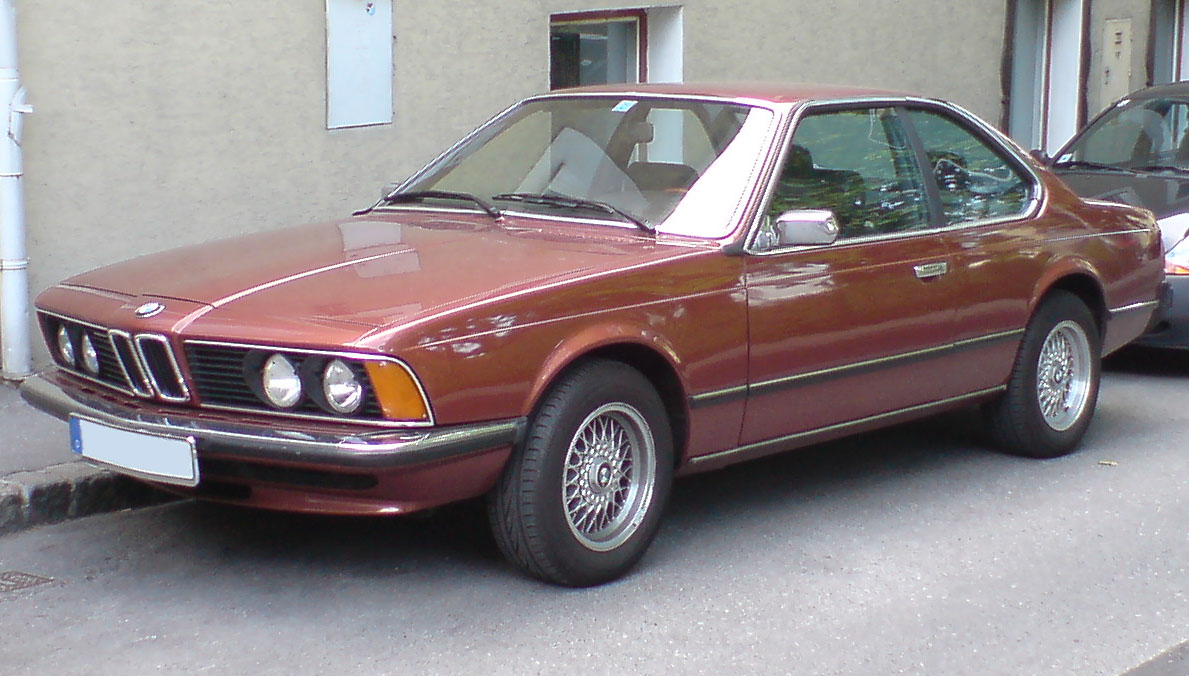 BMW 633 CSi Front Side